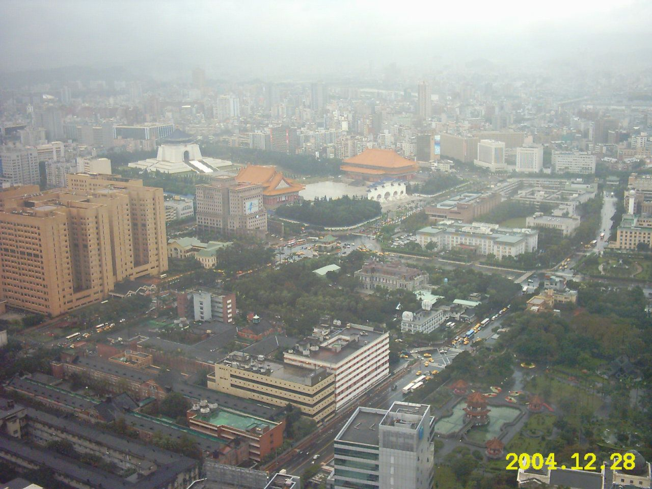 由新光人壽摩天大樓俯瞰臺北市東南。